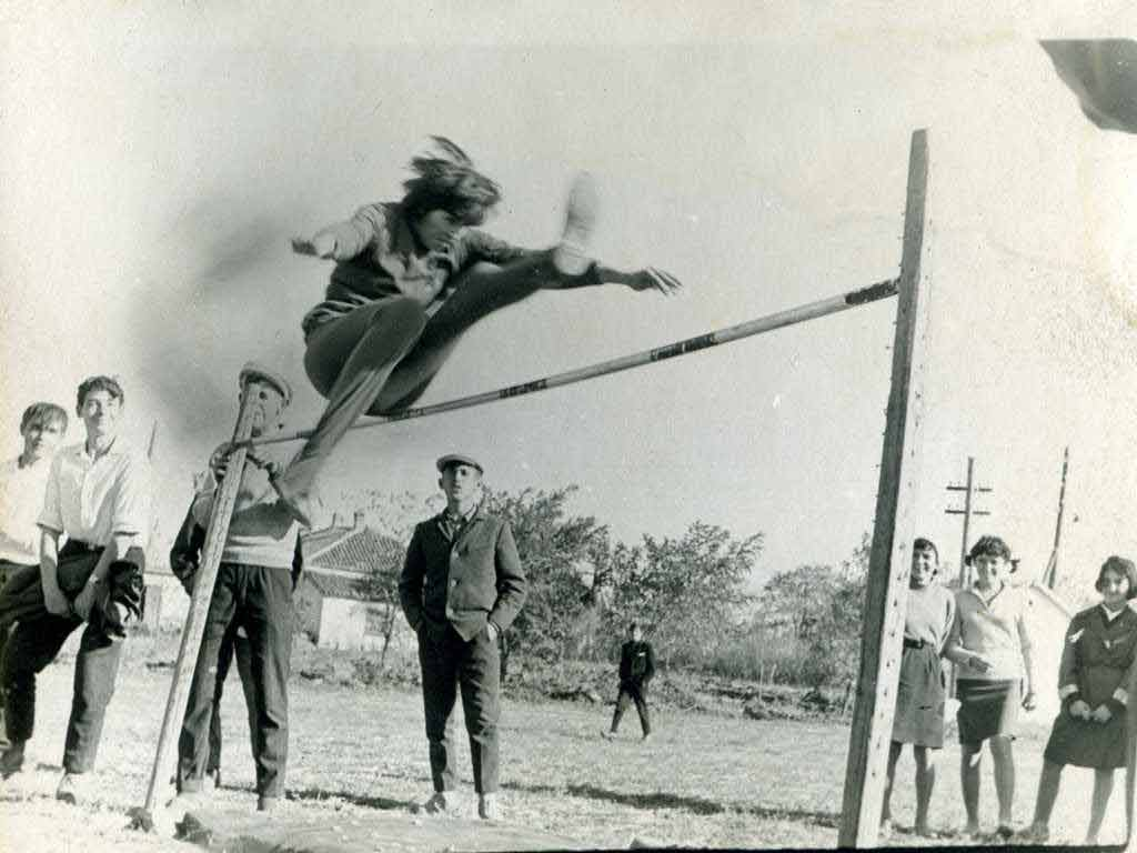 Ученики Заможненской (Чермалыкской) школы на районных соревнованиях. Фотография 60-х годов.